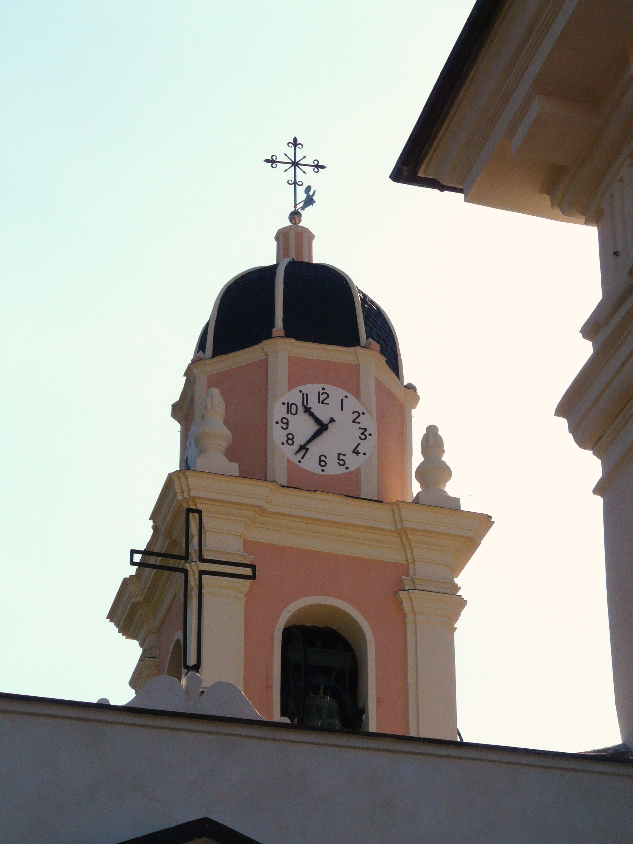 Campanile della chiesa di Santa Sabina nella frazione di Trigoso, Sestri Levante, Liguria, Italia